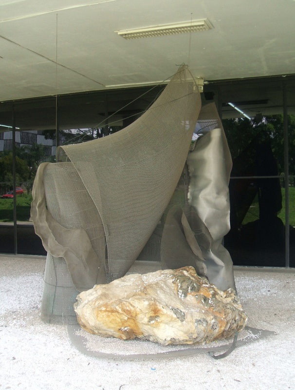 Iole de Freitas - Sem título, 1997. Escultura no acervo do Museu de Arte Moderna de São Paulo, no Parque do Ibirapuera.